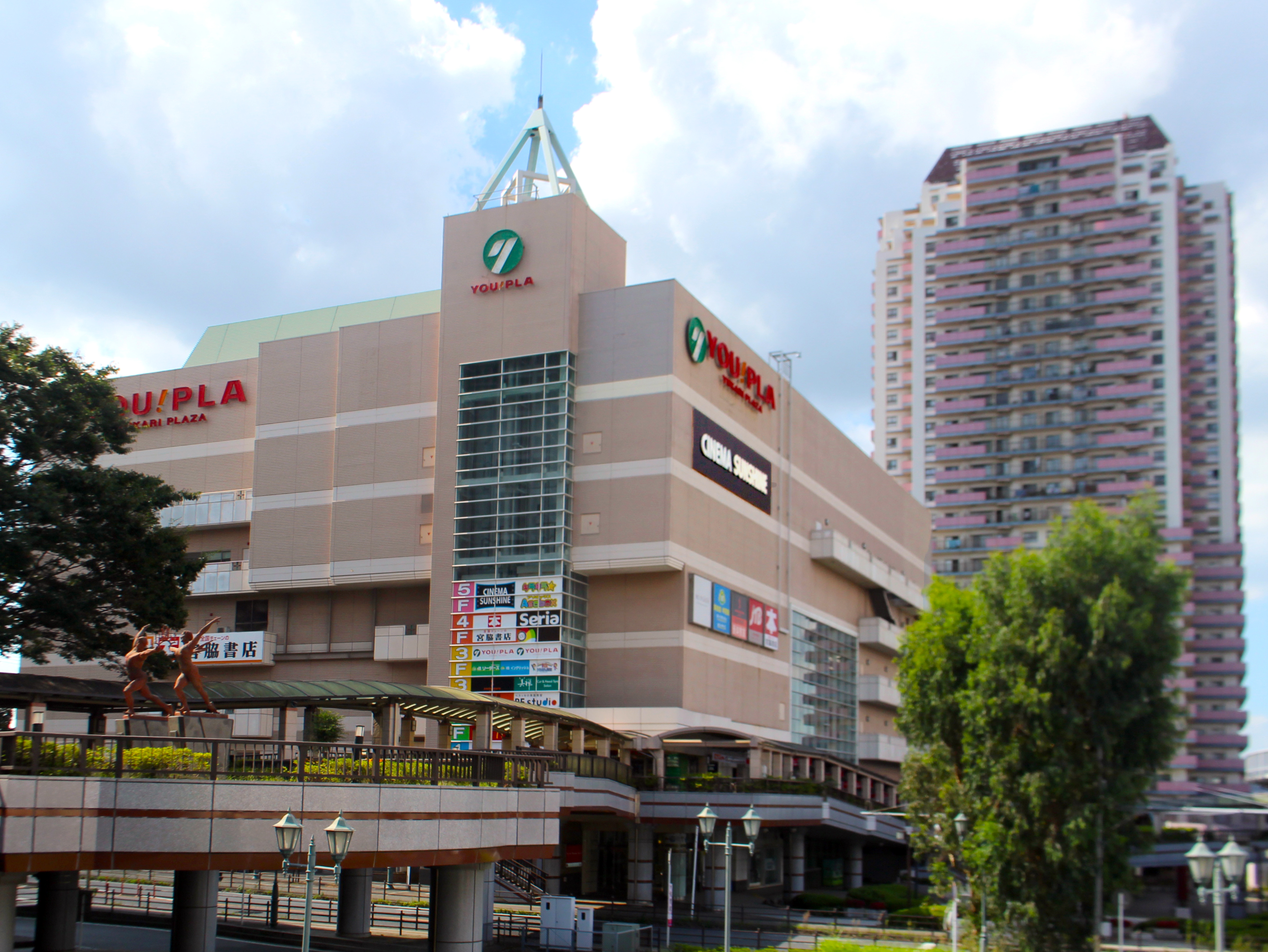 ユーカリが丘駅より望むユーカリプラザ